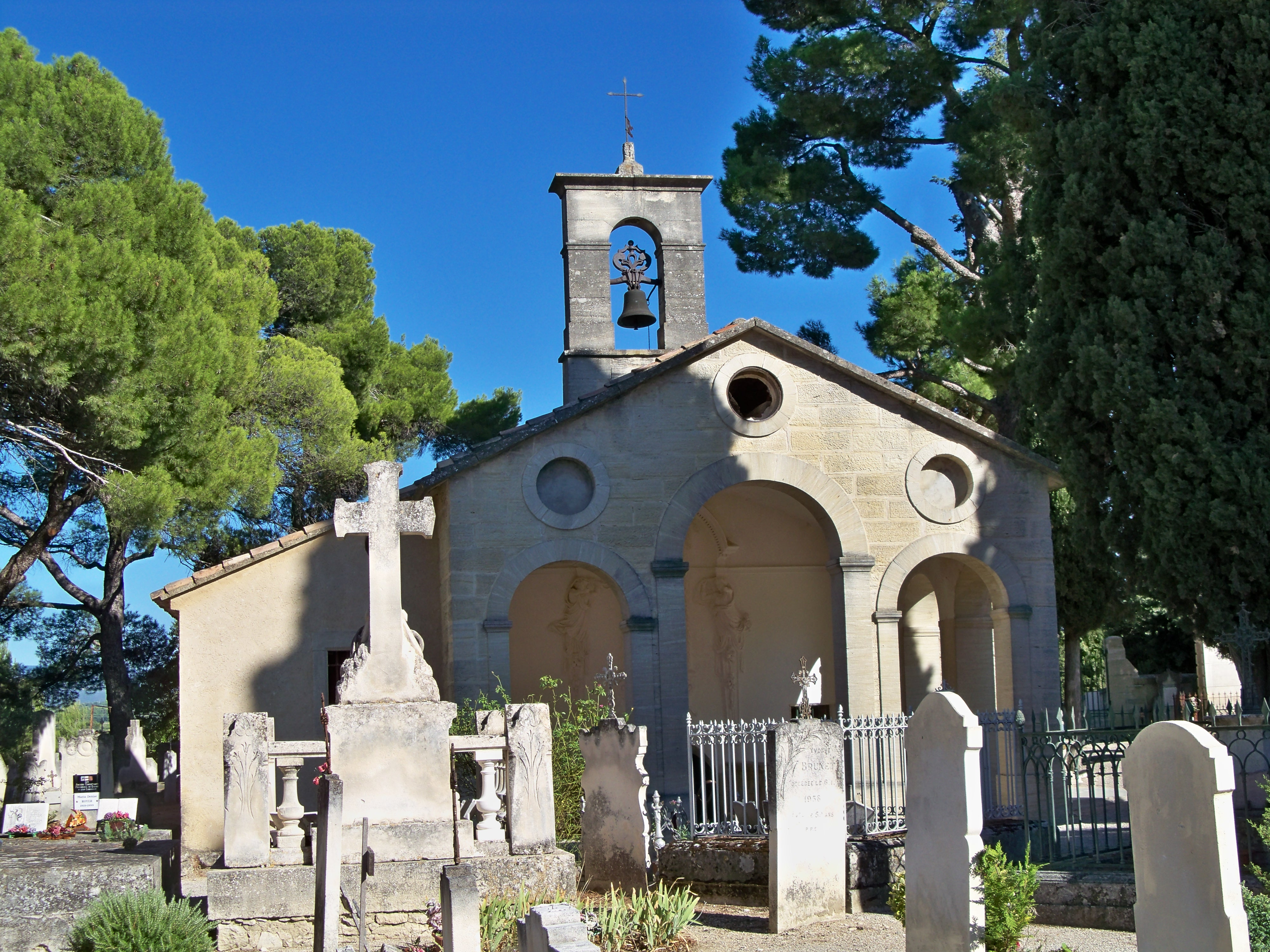 Chapelle Notre Dame de Pareloup à Mazan (84)